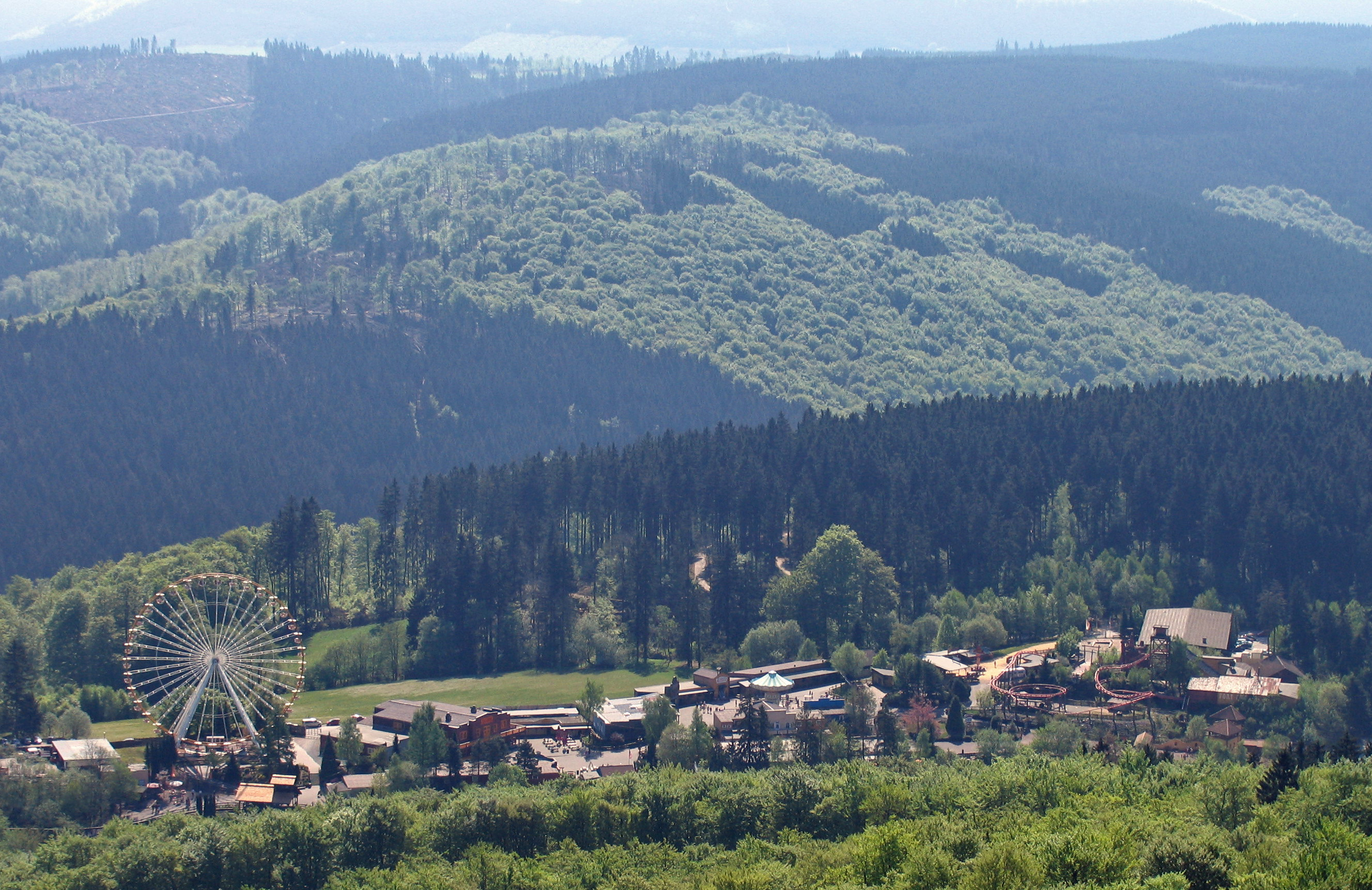 Fort Fun Abenteuerland seen from Stüppelturm